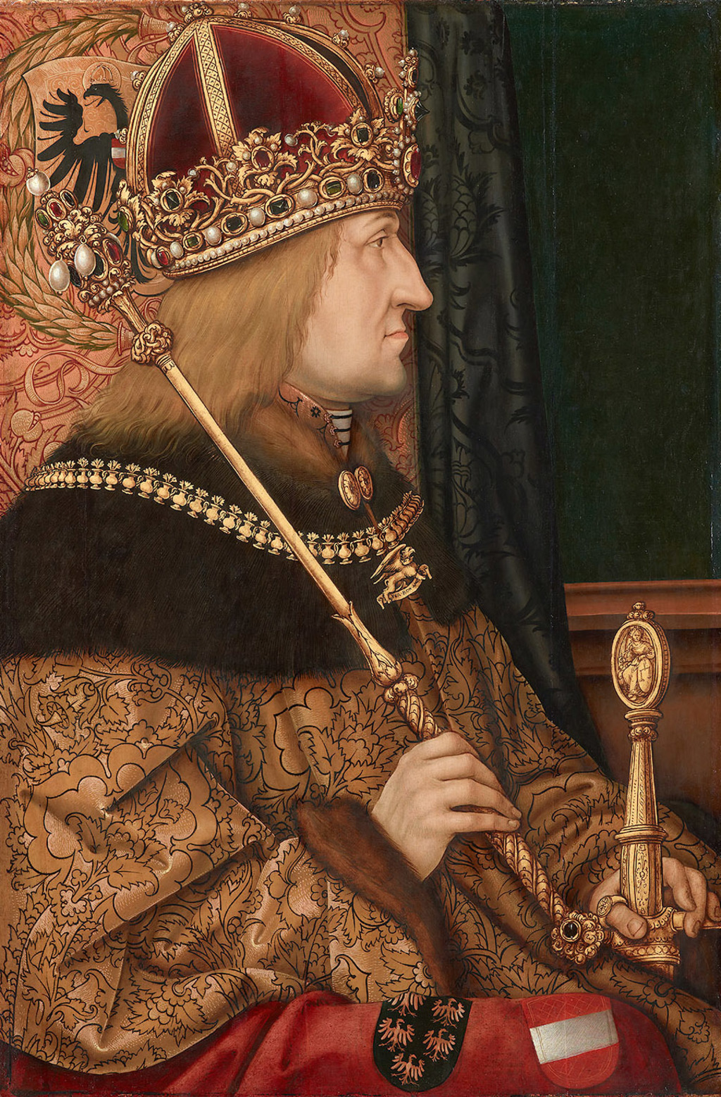 Kaiser Friedrich III. (1415-1493), nach einem verlorenen Original von 1468